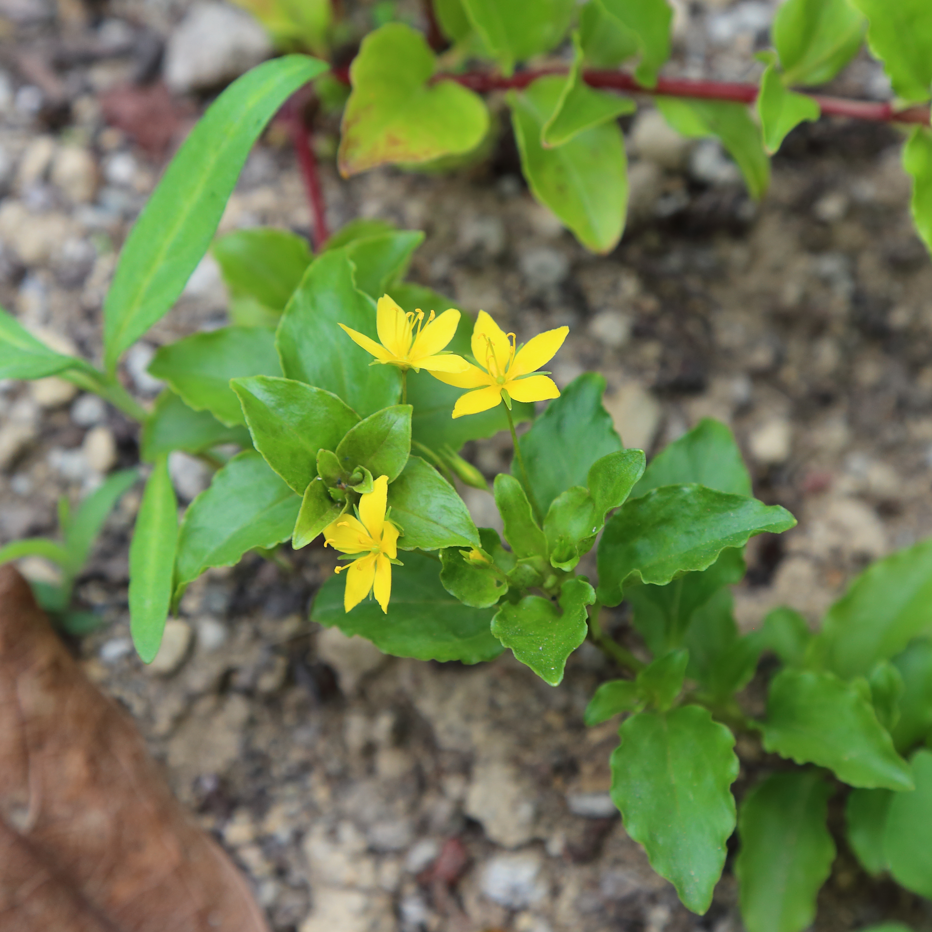 Lysimachia nemorum eller Lysimachia azorica i Terra Nostraparken, Furnas, Azorerna.